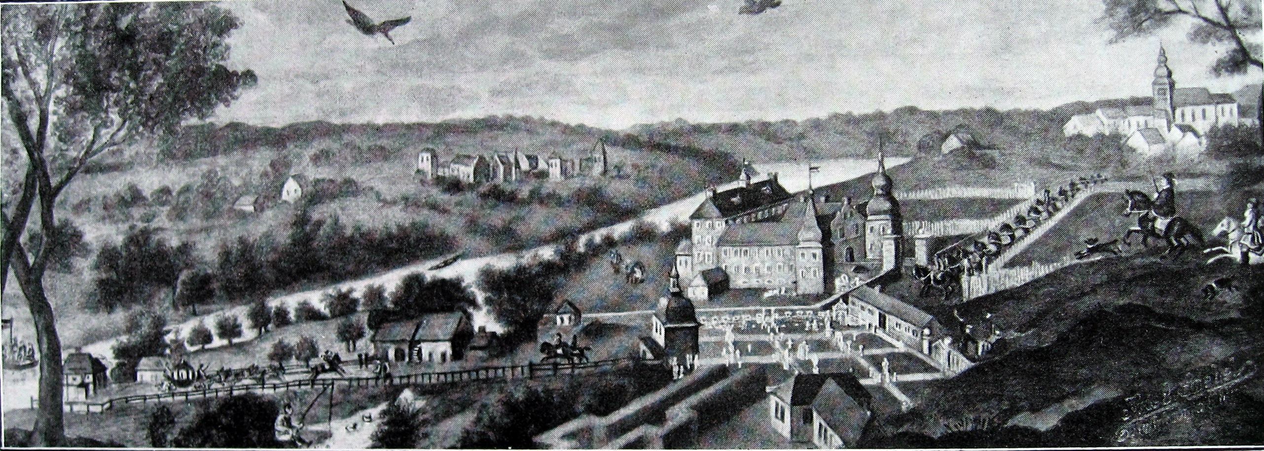 Witten, alte Stadtansicht nach einem Gemälde im Märkisches Museum, Aufnahme von Göbel, Witten